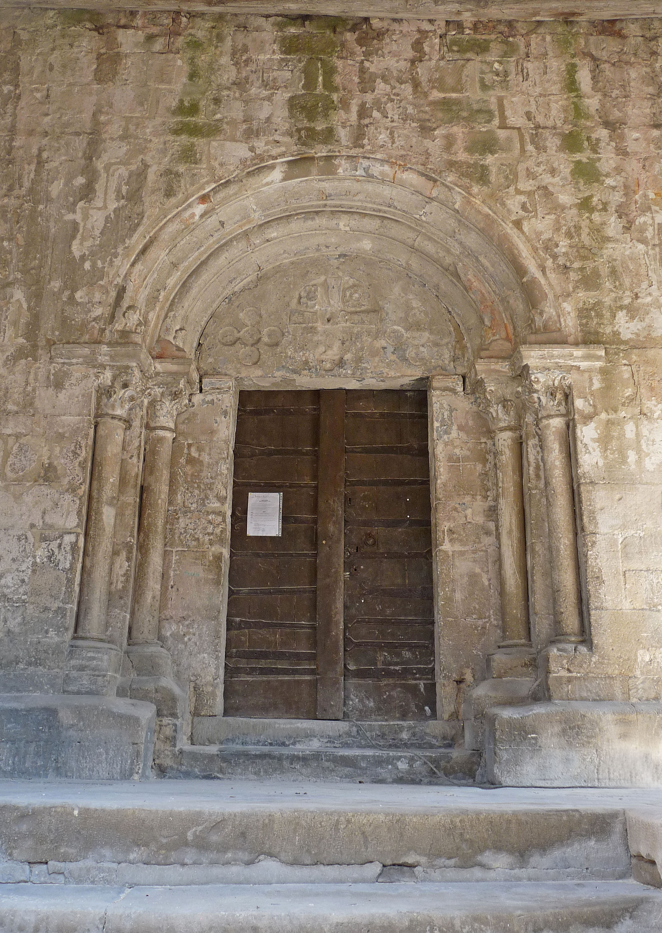 Portail occidental de l'église paroissiale de la Sainte-Croix à Suzannecourt (Haute-Marne), en travaux.